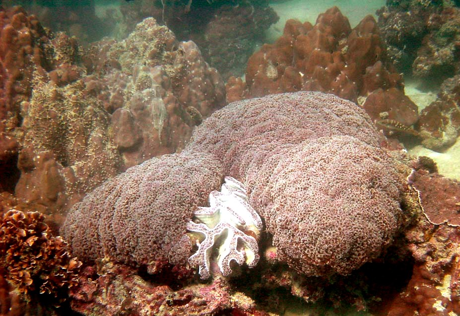 Colonia de Euphyllia ancora parcialmente retraída. Koh Phangan, Tailandia